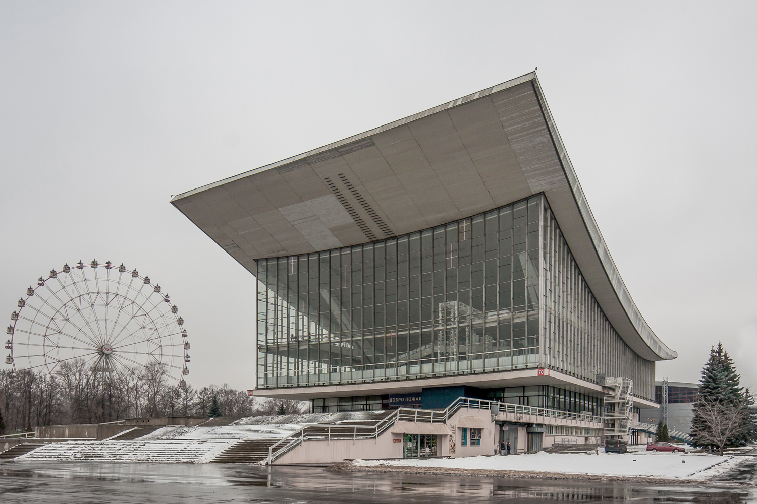 Монреальский павильон ВДНХ